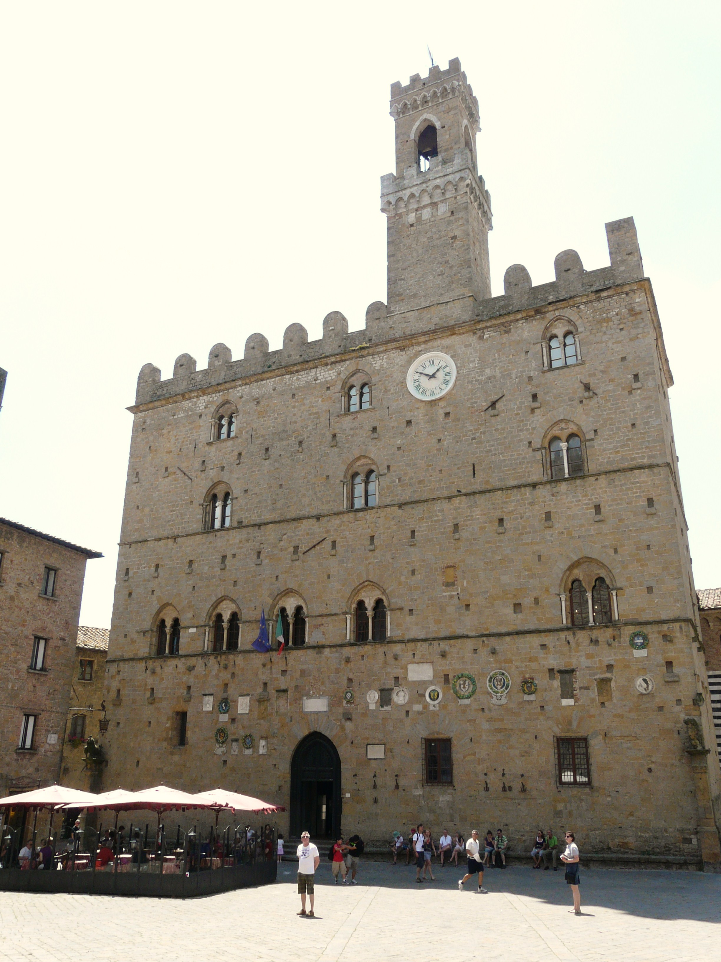 Palazzo dei Priori, Volterra, Toscana, Italia